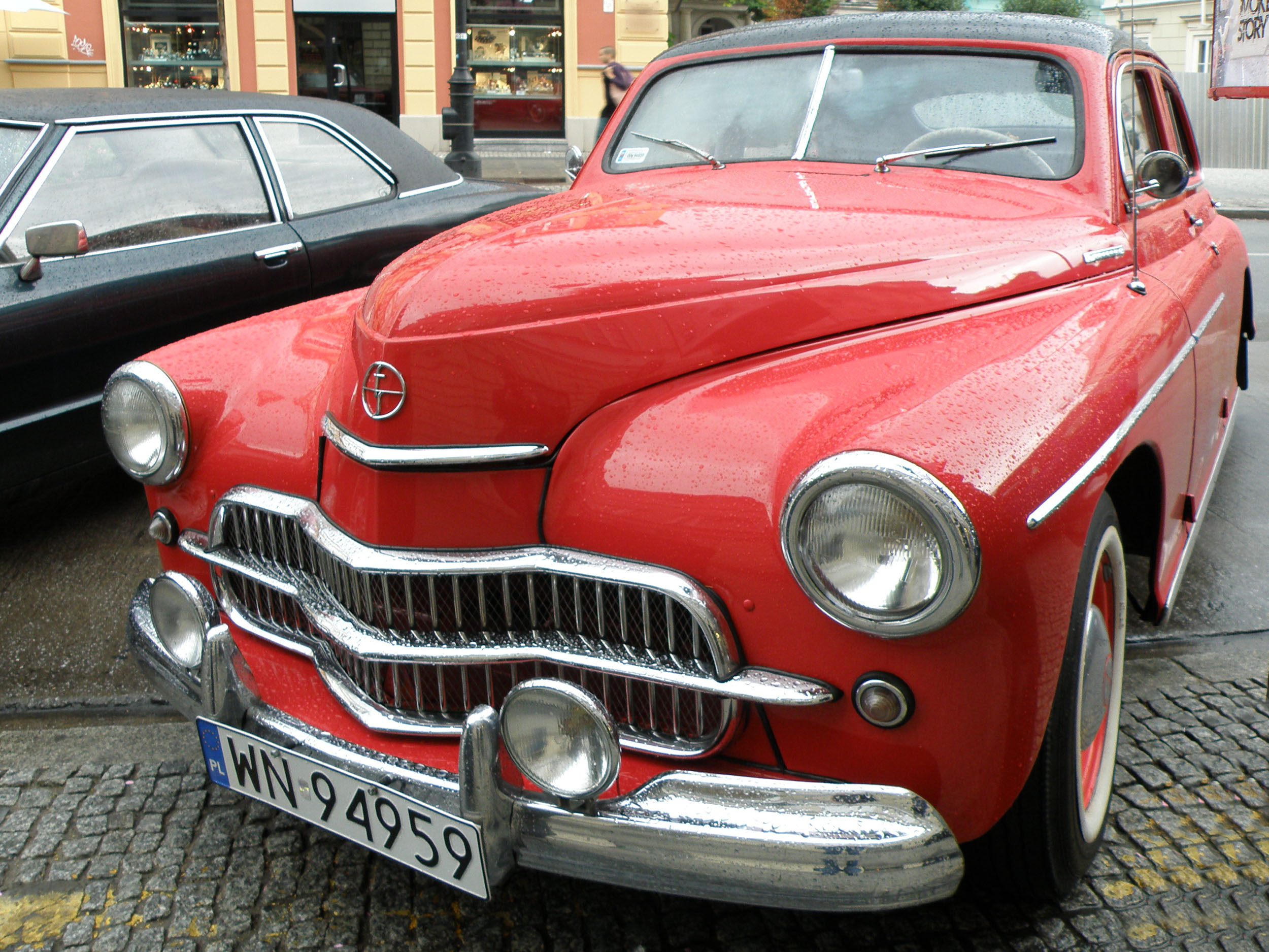 Warszawa, ul. Nowy Świat, II Rajd Pojazdów Zabytkowych "Stare jak nowe" 2009.